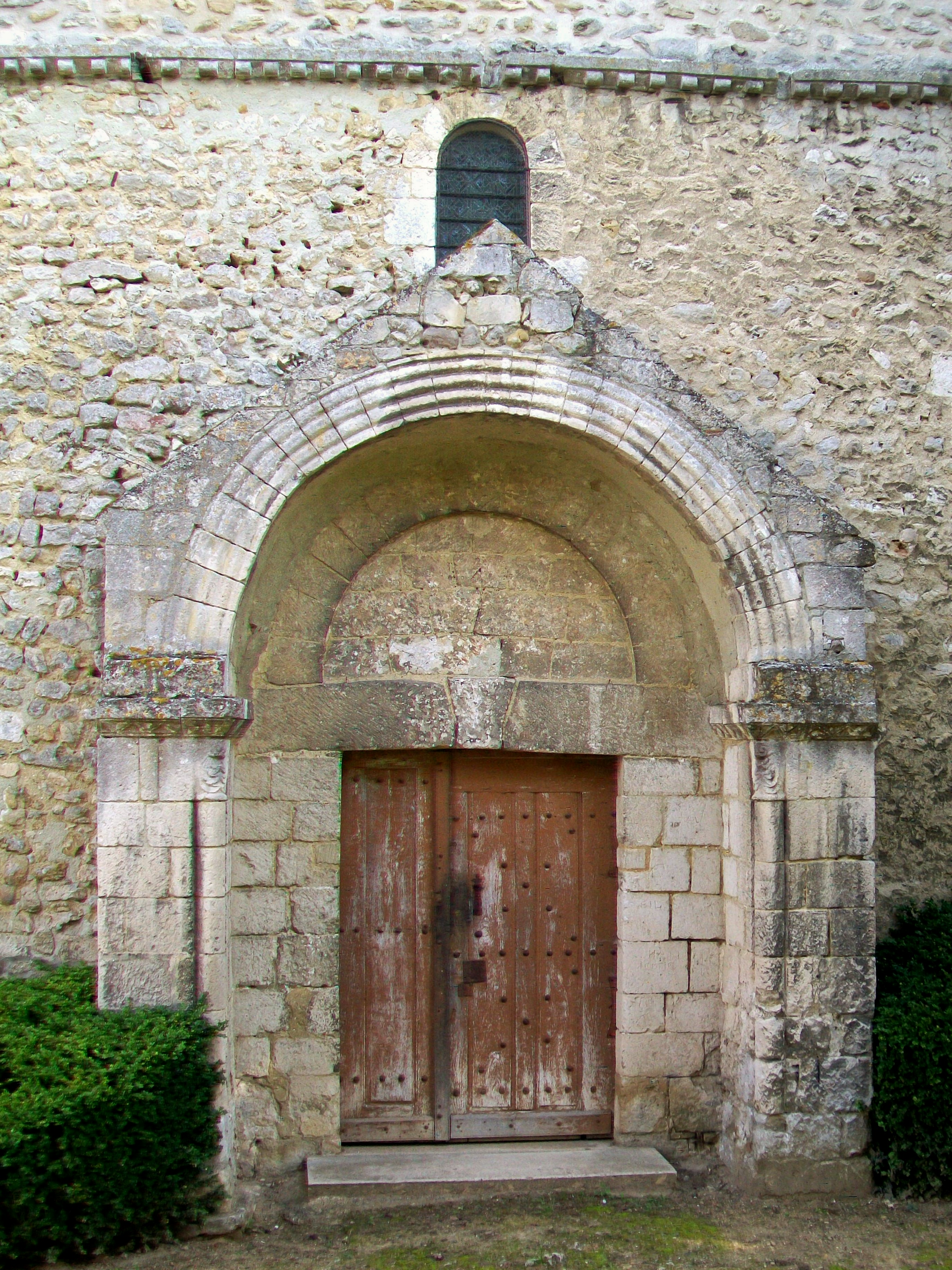 Le portail sur la façade occidentale.